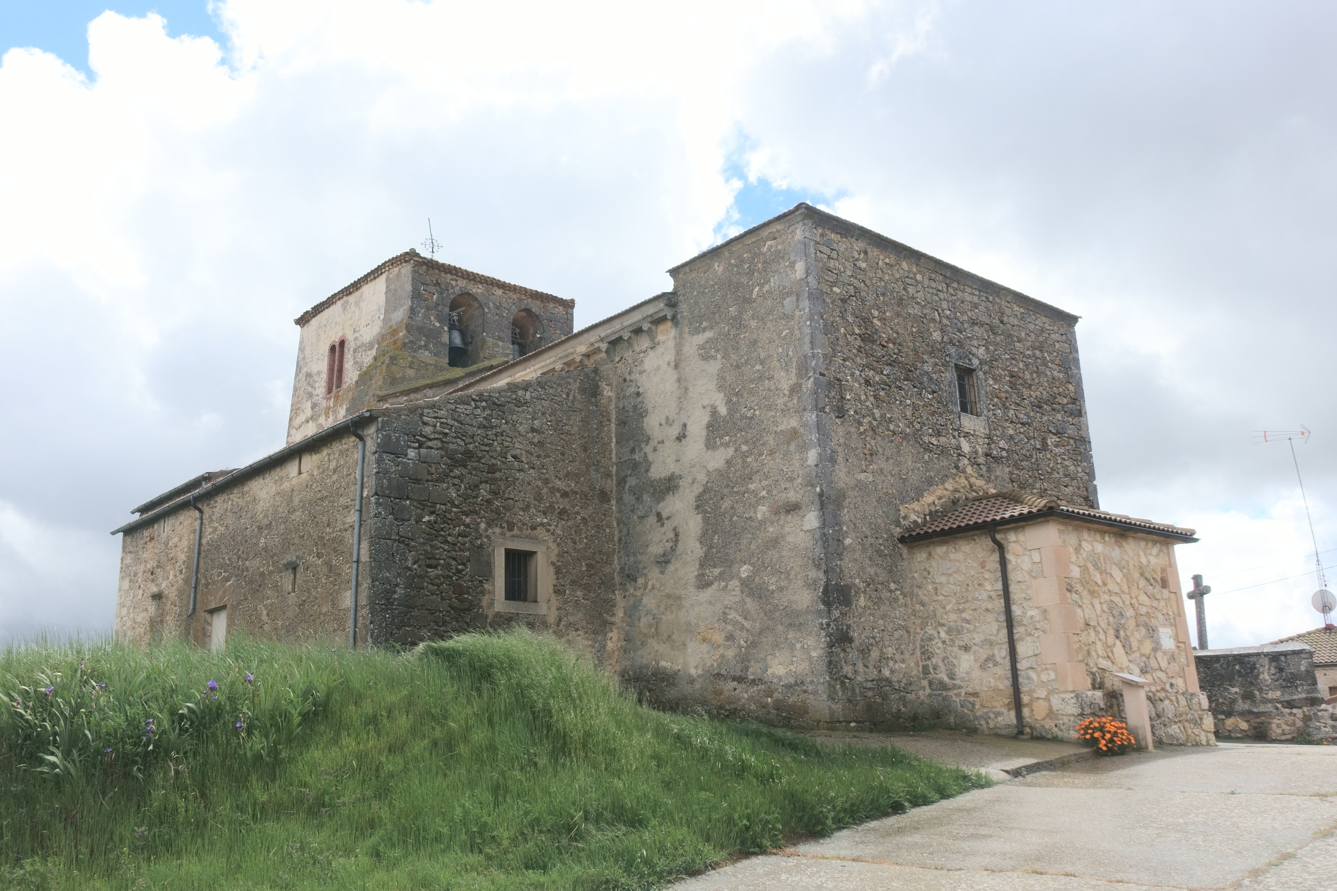 Iglesia de la Concepción en Castro de Fuentidueña (Segovia, España).